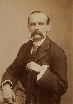 Frederick Lugard, 1st Baron Lugard (1858-1945)